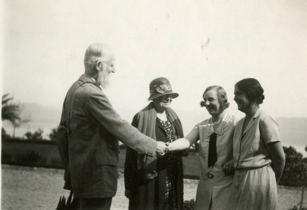 שאו מבקר בארץ ישראל ומתאכסן בוילה מלצ'ט ליד המושבה מגדל ליד הכנרת. בתמונה לוחץ את ידה של אווה ארלי רעיתו של ארלי רדינג , עוד בתמונה הדסה סמואל רעיתו.